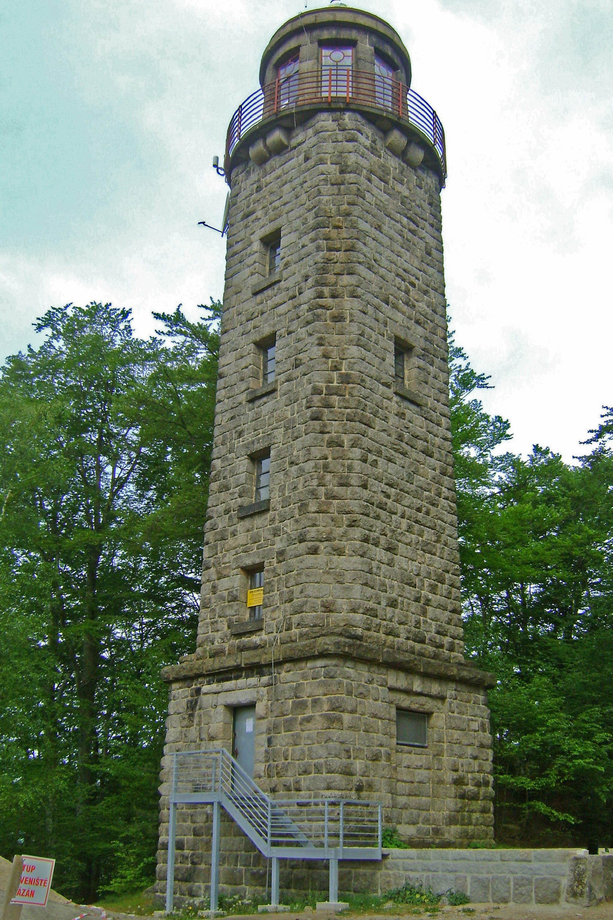 Kamienna wieża widokowa "Proseč" na wzniesieniu Prosečský hřeben w północno-środkowych Czechach, w Sudetach Zachodnich, w Kotlinie Libereckiej (czes. Žitavská pánev) w grzbiecie Prosečský hřeben.